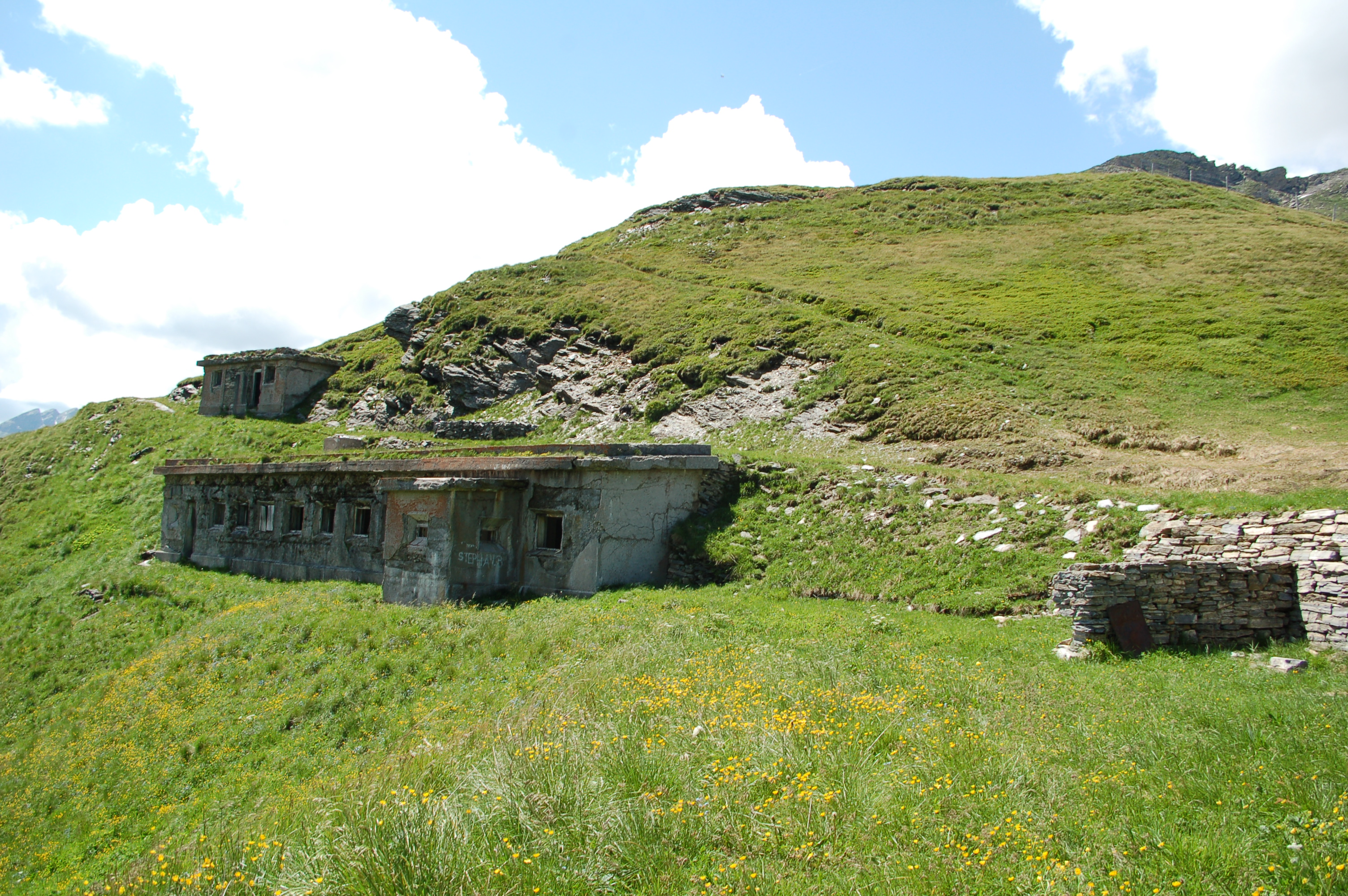 Offen stehende Verteidigungsanlagen auf der österreichisch-italienischen Grenze oberhalb des Pflerschtals auf der Höhe des Portjochs